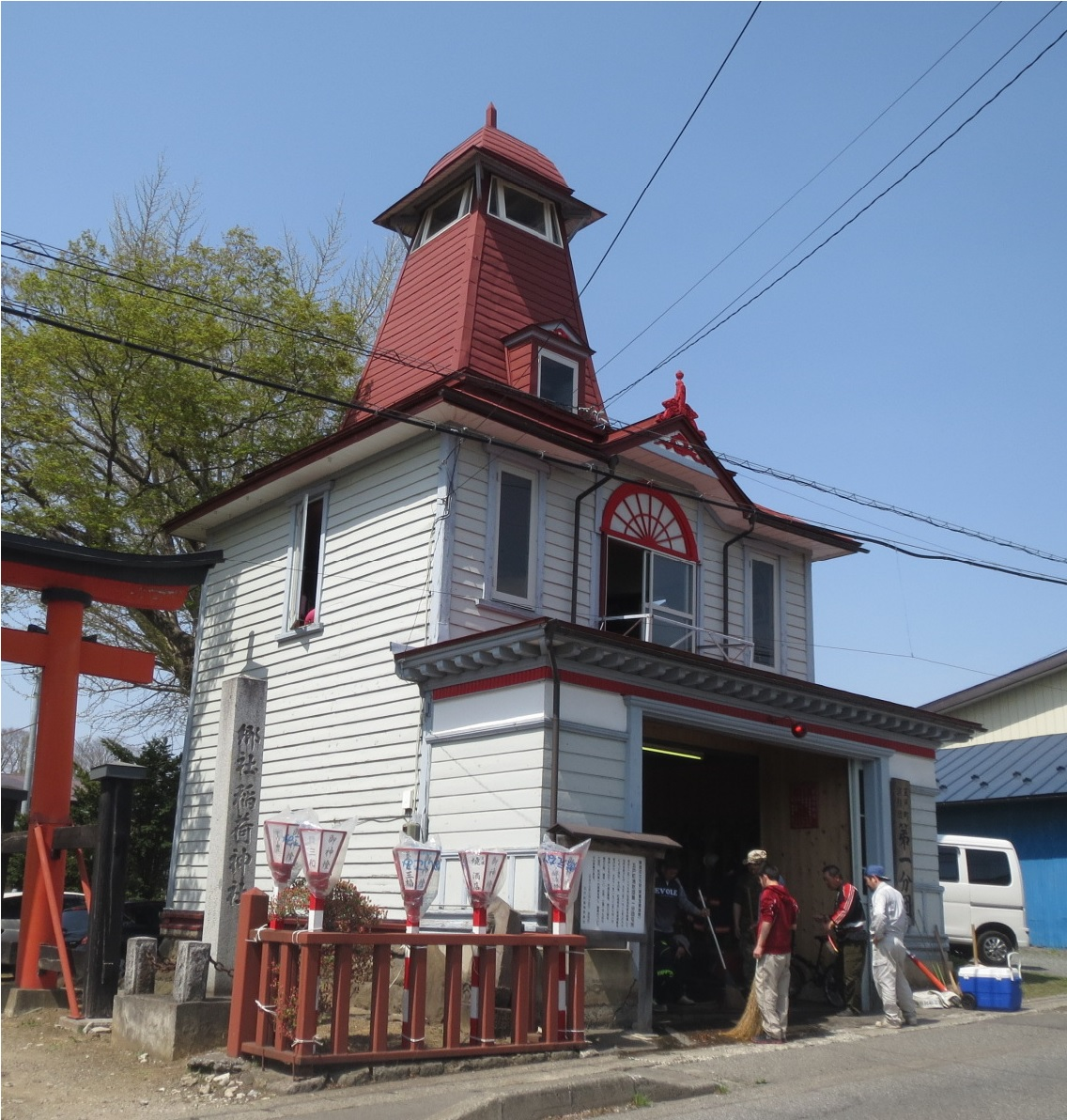 五戸町にある消防団第一分団屯所